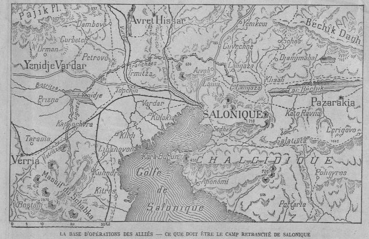 Fortifications des Alliés pour le camp retranché de Salonique, carte publiée dans Le Pays de France.